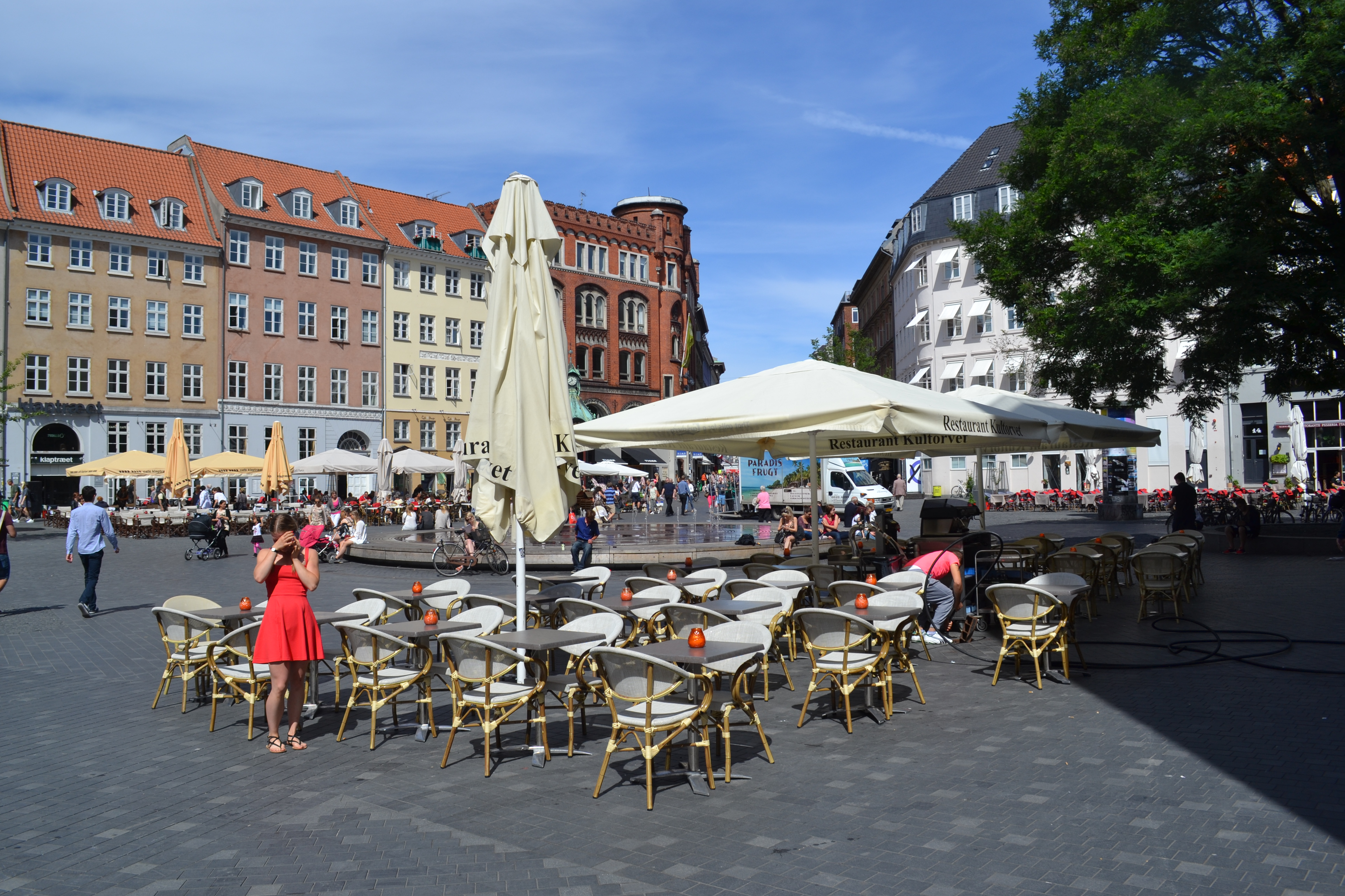 Kultorvet, Copenhagen, Denmark